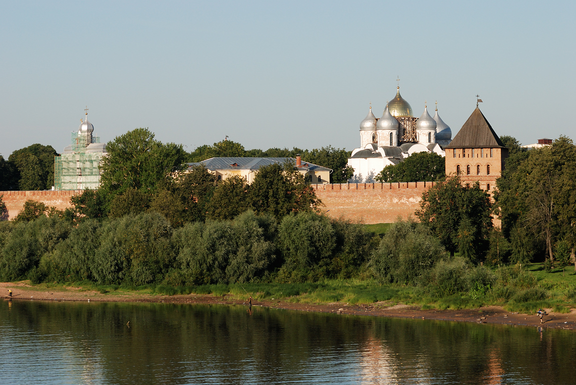 Středověké opevnění Velikého Novgorodu v Rusku